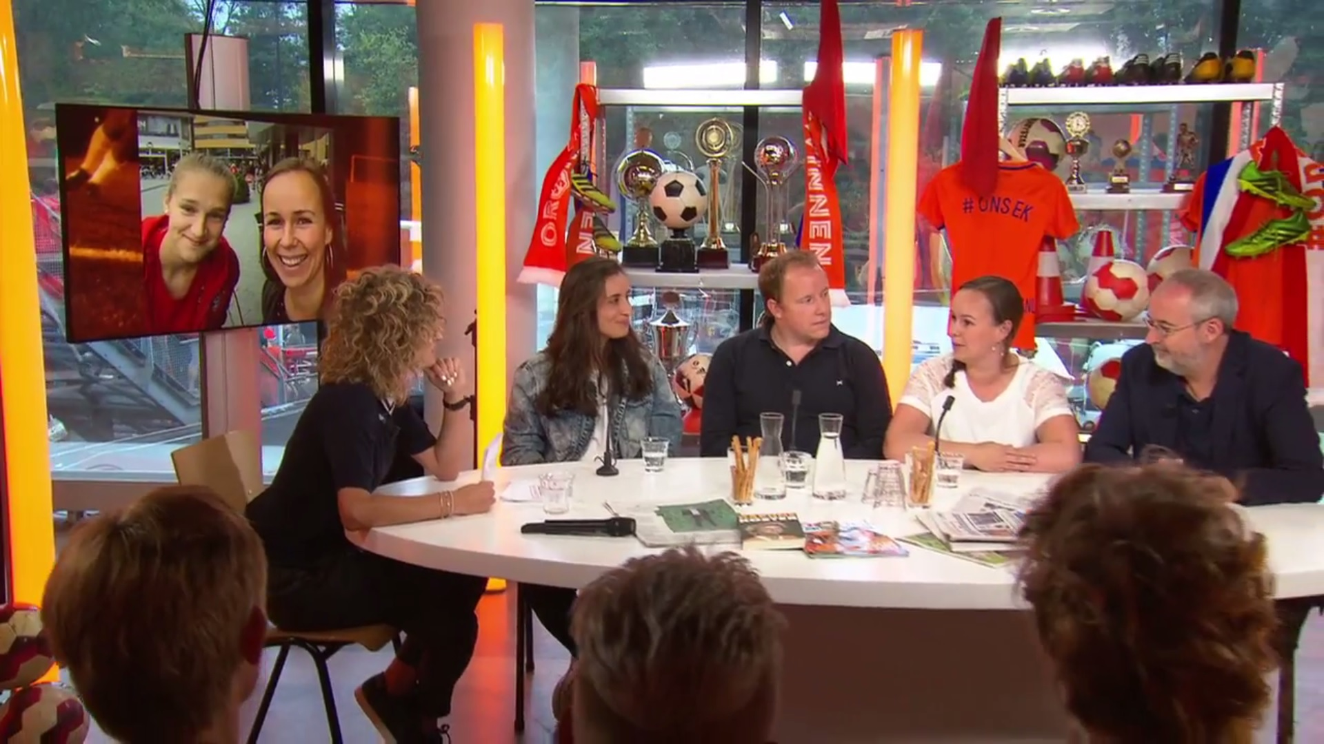 Borgers in haar eigen (TALK) show